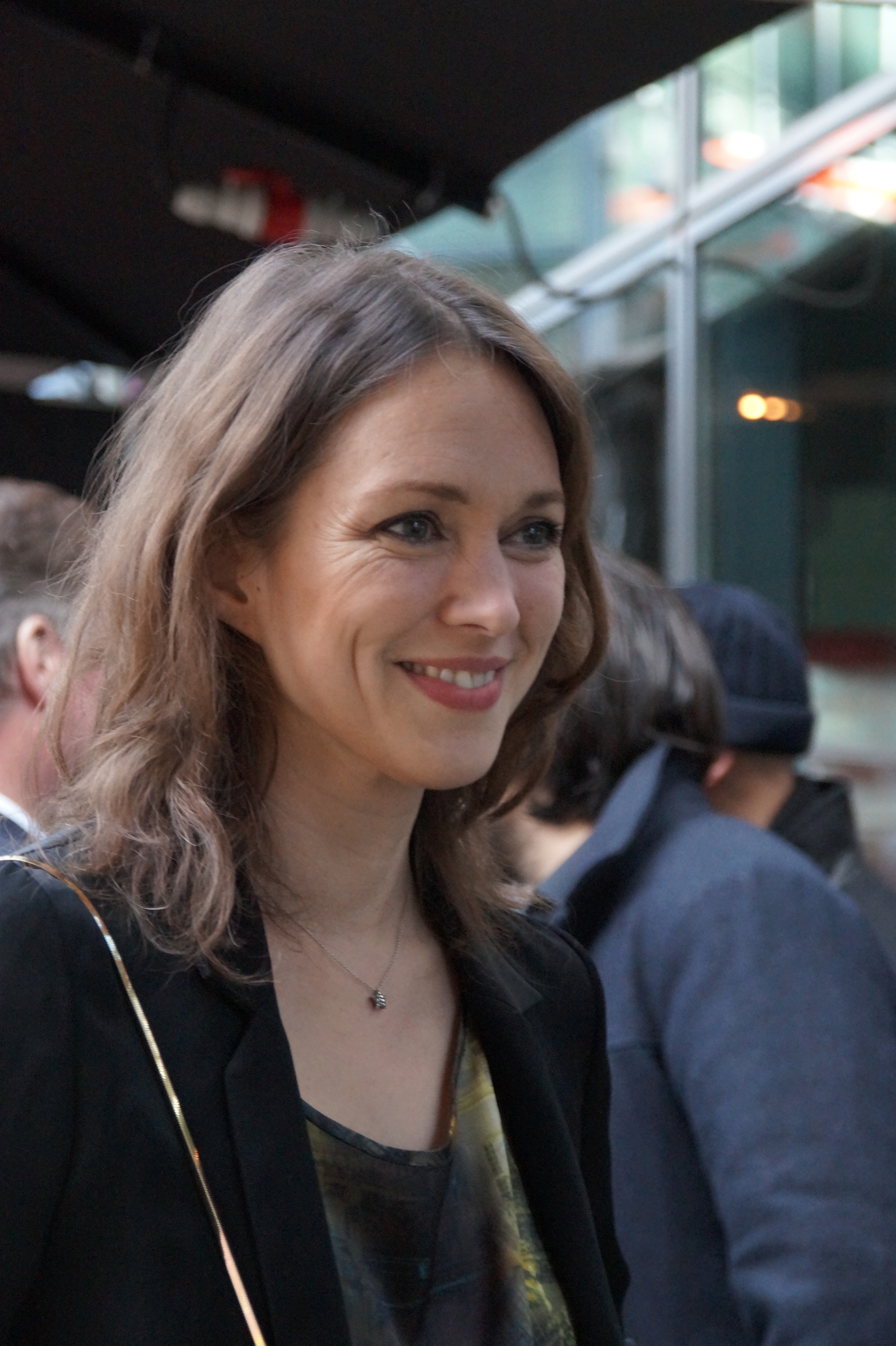 Nike Fuhrmann bei der Verleihung des Kurzfilmpreises "Blaue Blume", am 10.02.2016, im Sony Center Berlin.